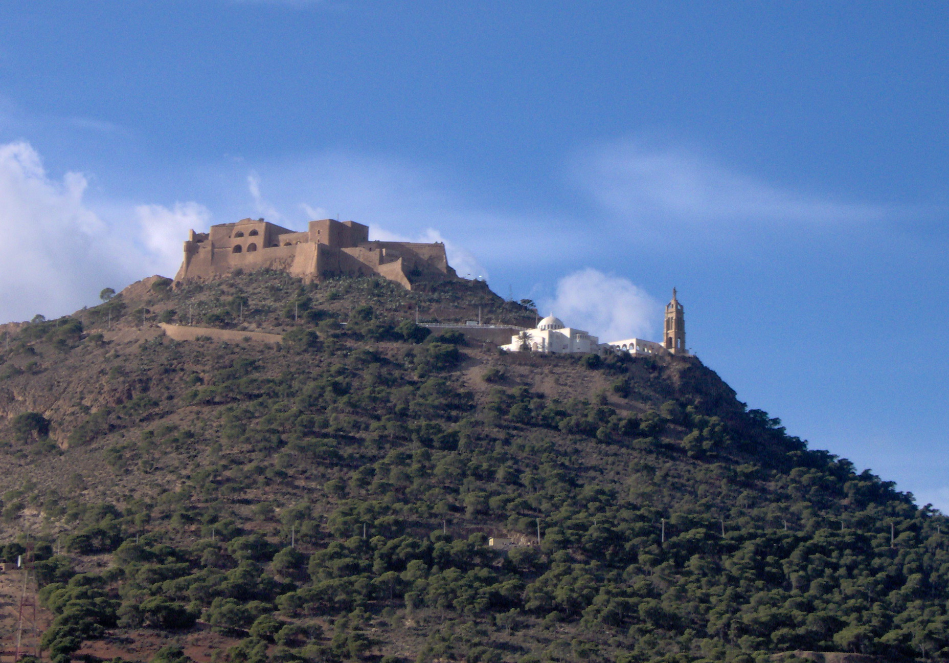 Oran, Santa Cruz, vue depuis le centre ville (Front de Mer)